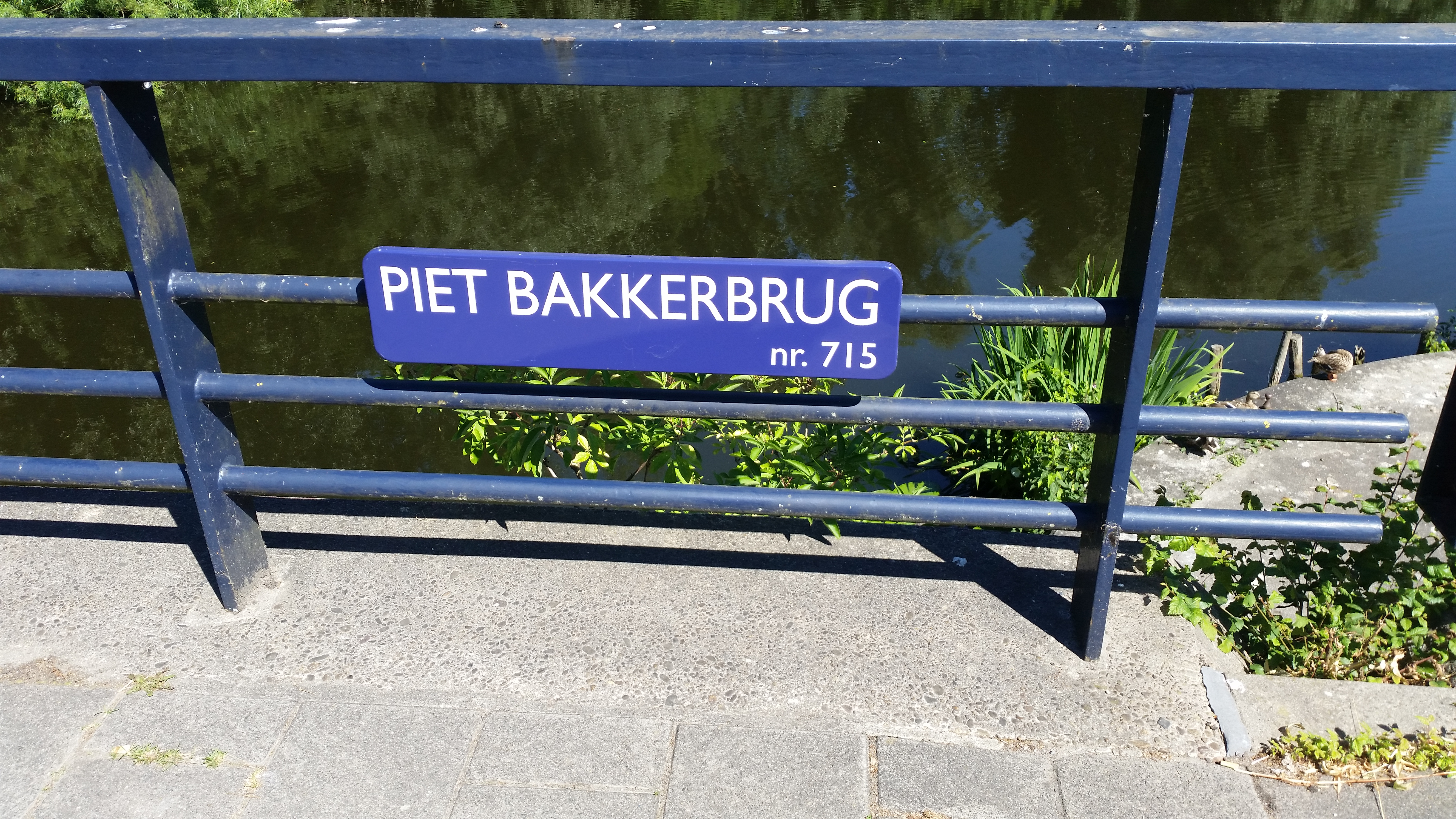 Brug 715, Piet Bakkerbrug, leuning met naamplaat